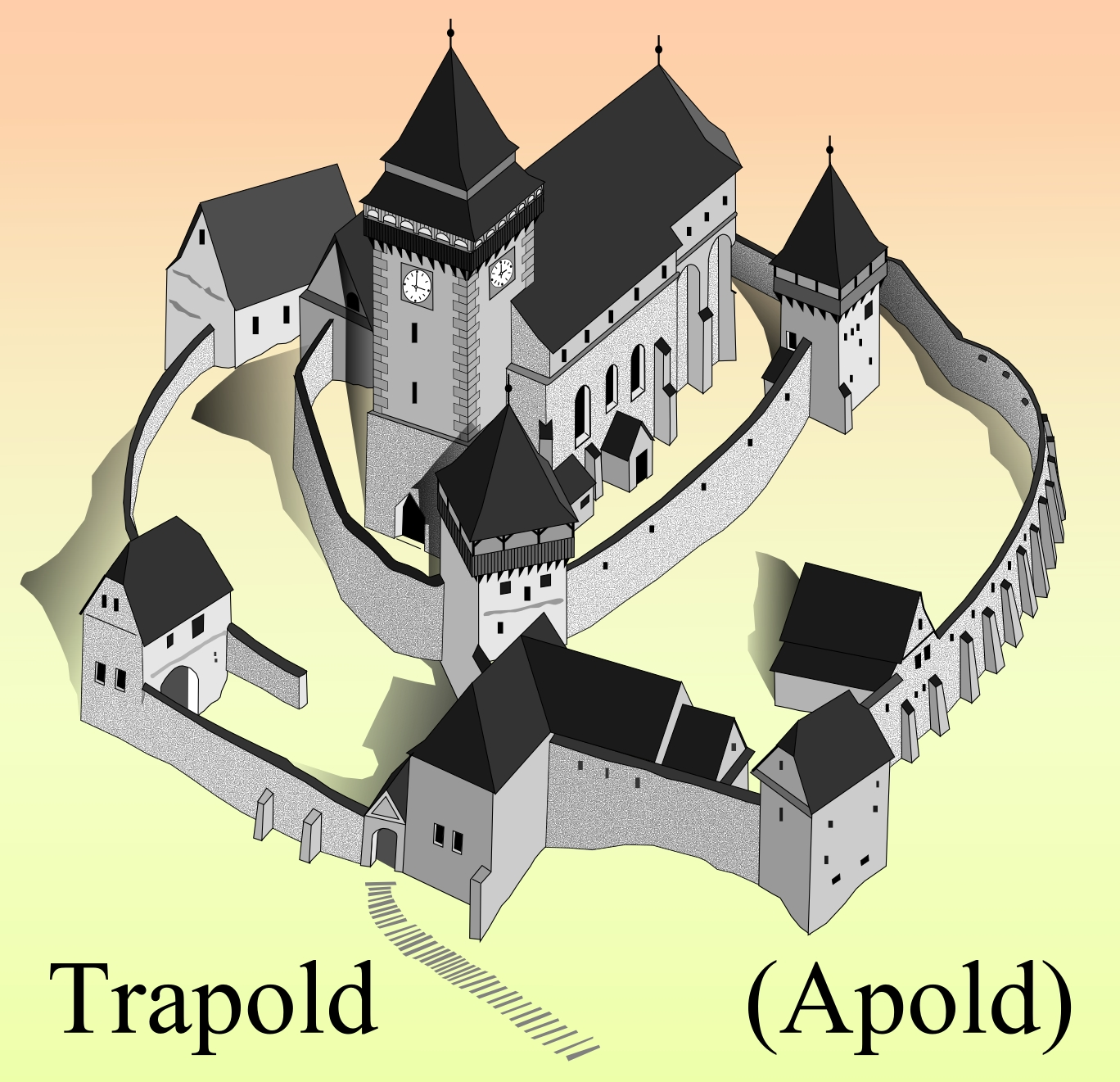 Biserica fortificata din Apold v1